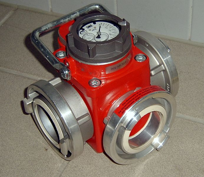 Druckbegrenzer